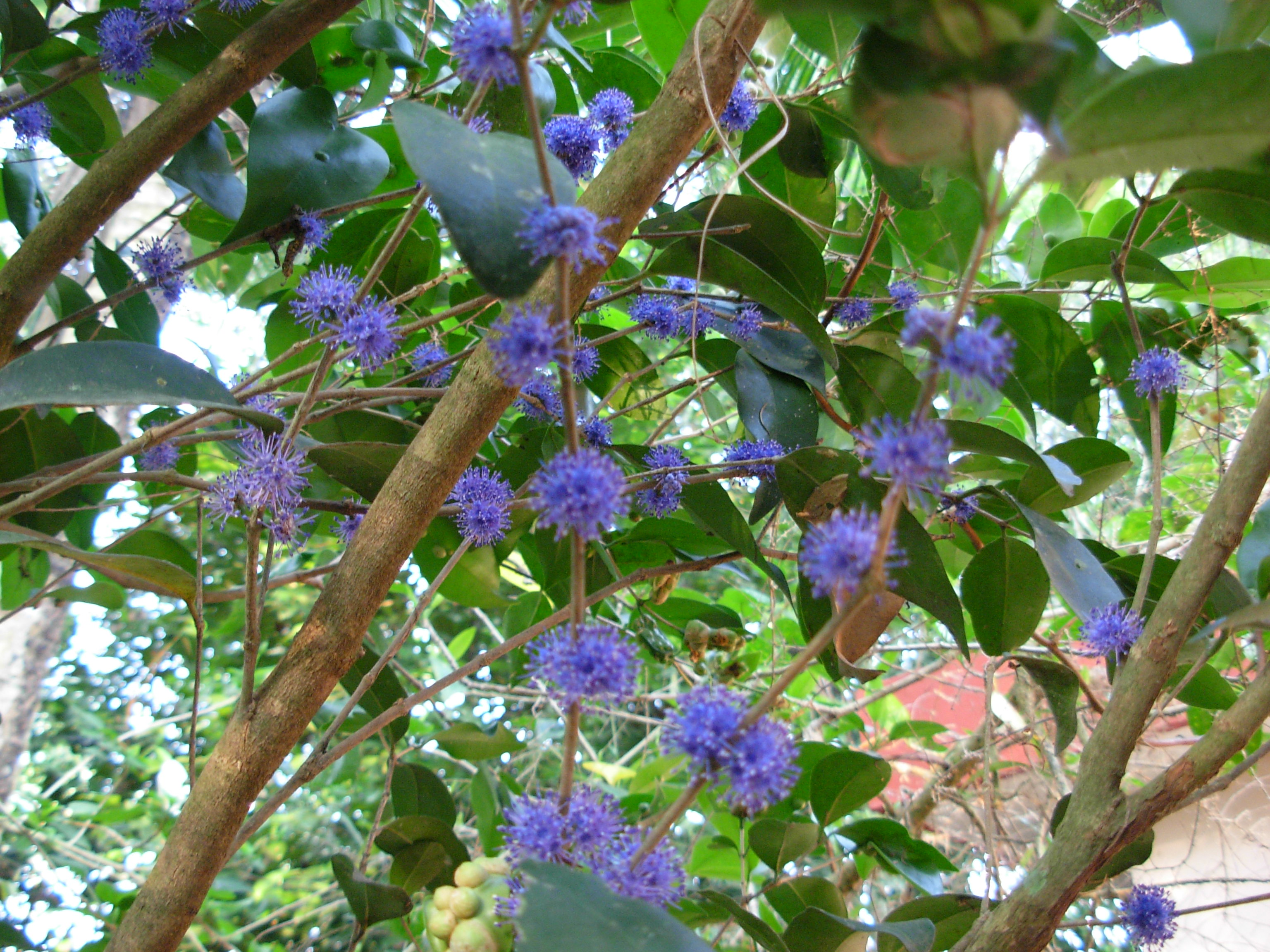 കാശാവിൻ കമ്പ്